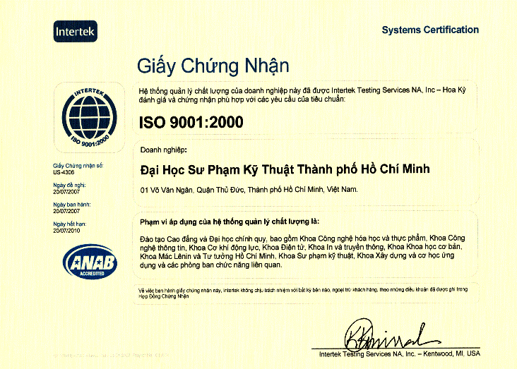 Hệ thống quản lý chất lượng của Đại học Sư phạm Kỹ thuật Tp. Hồ Chí Minh được đánh giá và chứng nhận đạt chuẩn ISO 9001:2000